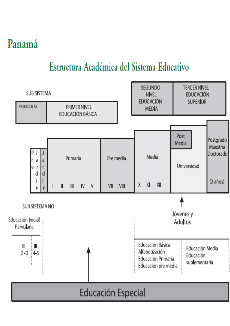 Estructura educativa de Panamá.